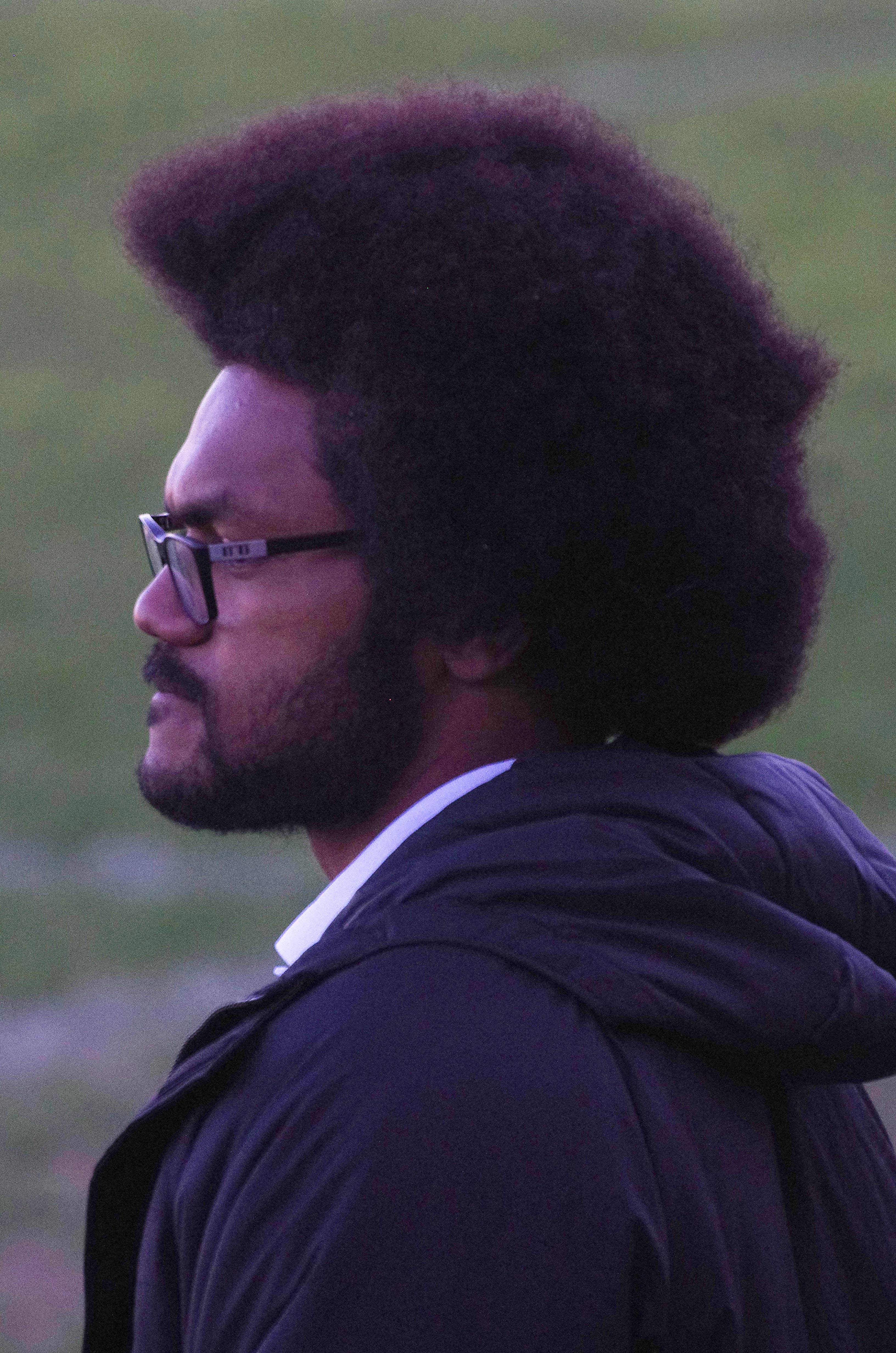 HENRY SPEIGHT